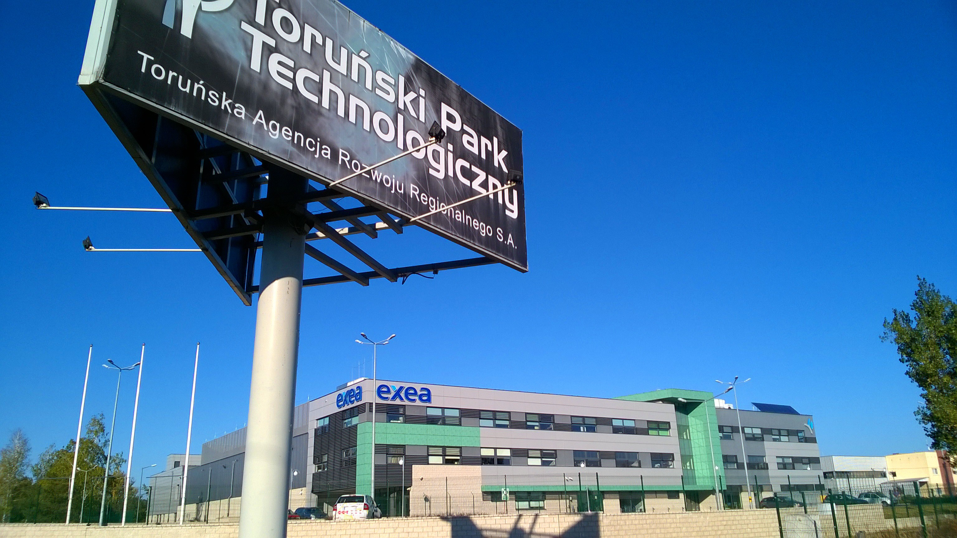 Toruński Park Technologiczny44